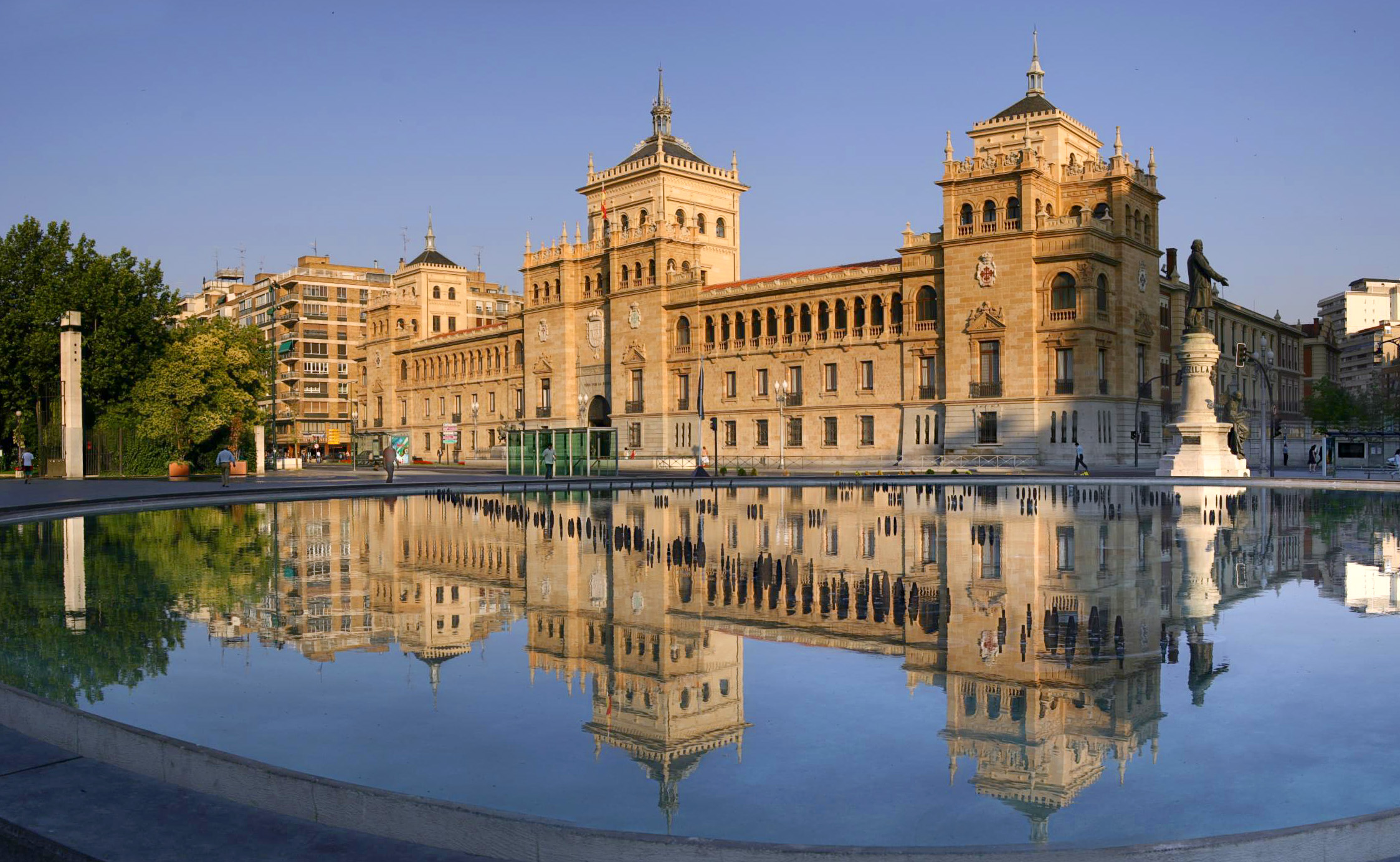 Academia Militar de Caballería, Valladolid, España.